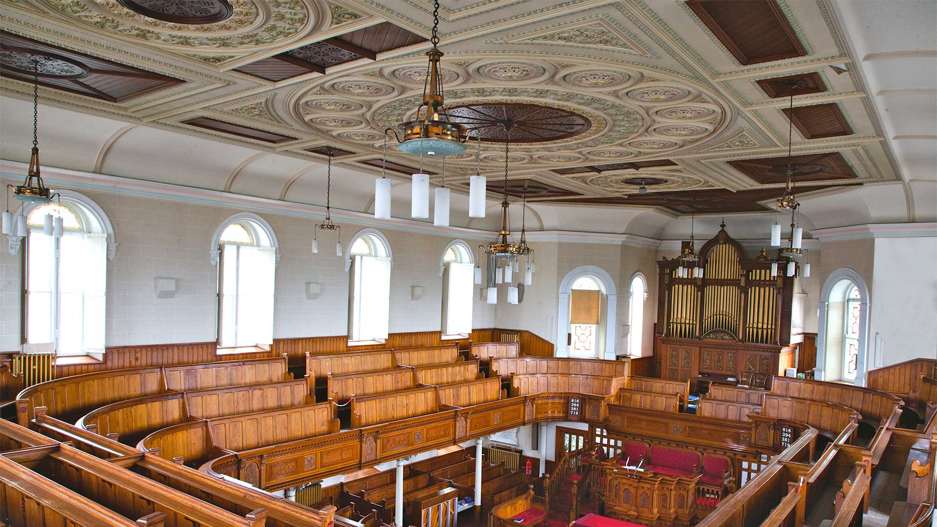 Llanelli, Capel Als Chapel